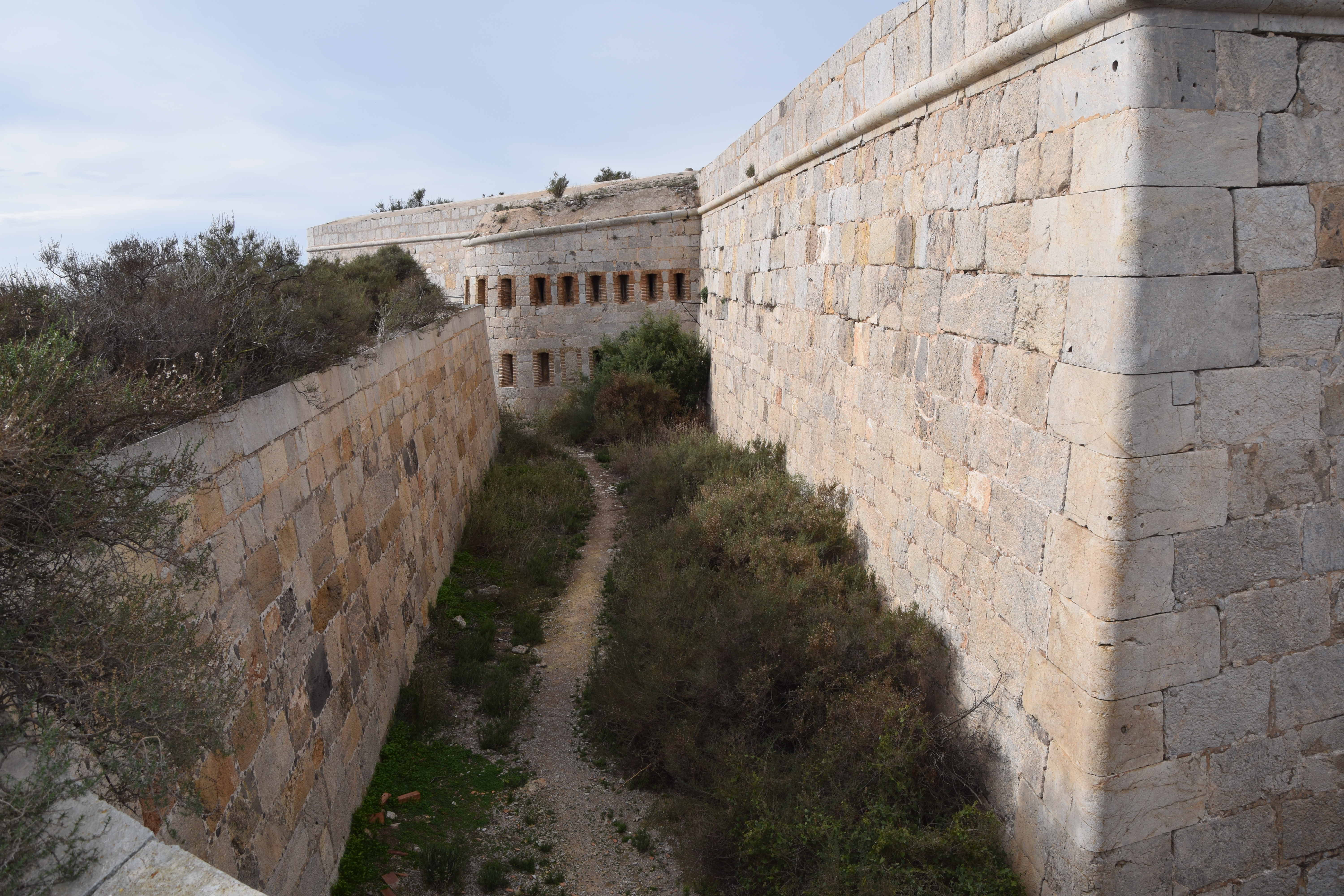 Castillo de San JuliánLa construccion del castillo se finalizo en el año 1888, y como los otros dos de la ciudad de Cartagena tuvo como finalidad principal la defensa de la ciudad y su base naval posee cinco frentes defensivos tres de los cuales son de tipo abaluartado en los restantes uno es de tipo poligonal con su corespondiente caponera y el ultimo que defiende la puerta de acceso es del tipo atenazado.